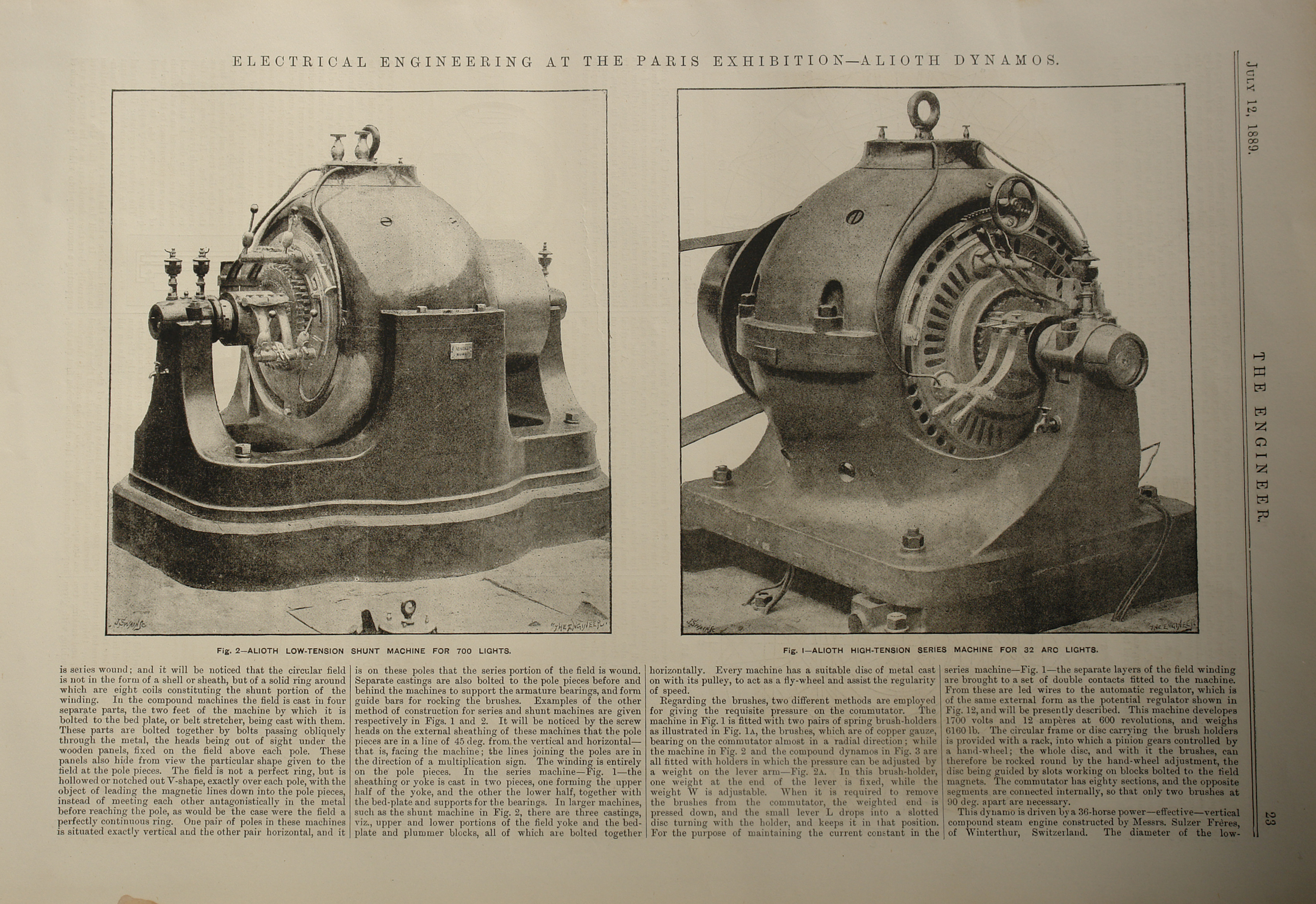 Moteurs à courant continu R.Alioth et Cie construits en carcasse circulaire dès 1889.